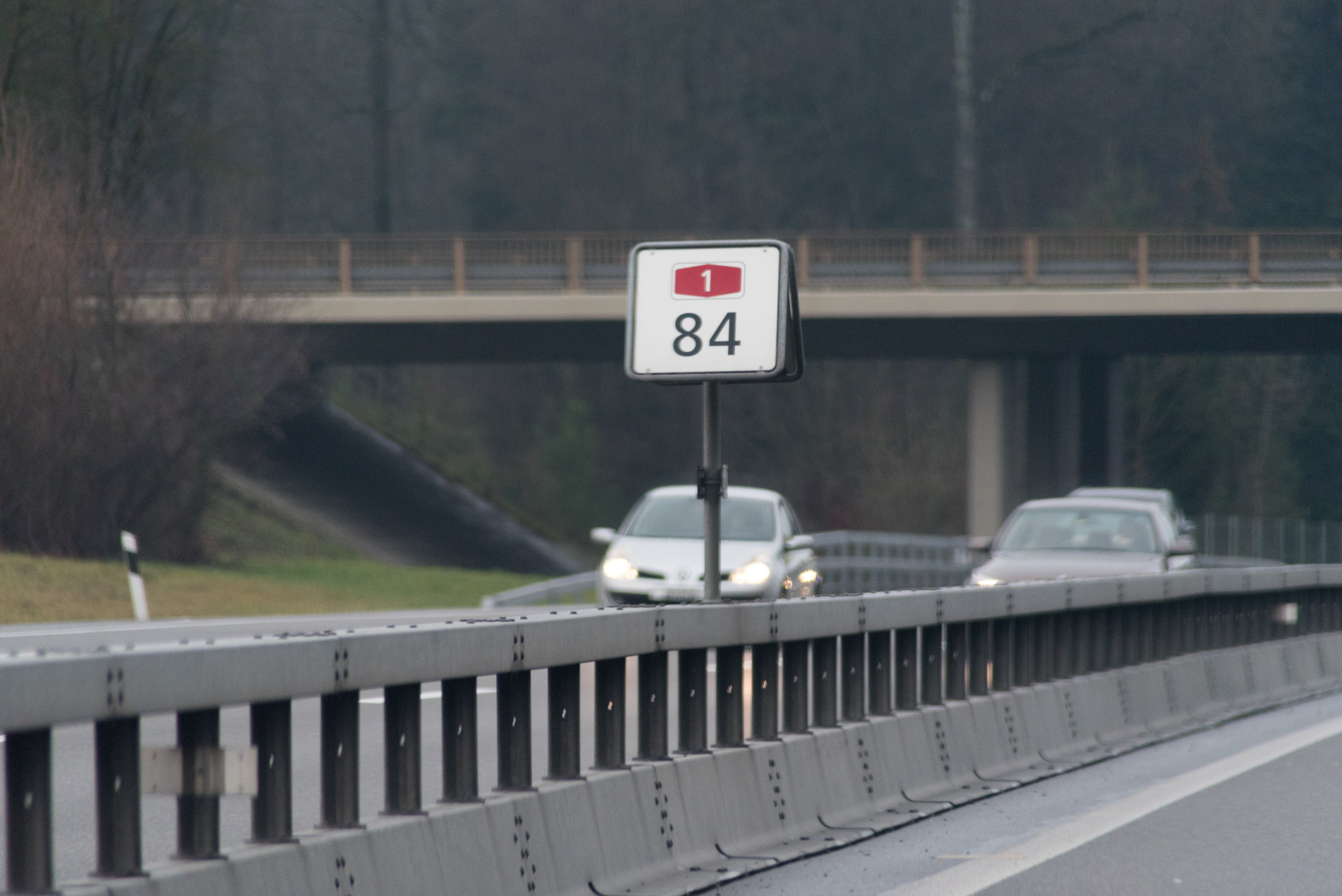 Autobahn, Mittelstreifen, A1 Aarau-Zürich, mit Kilometertafel